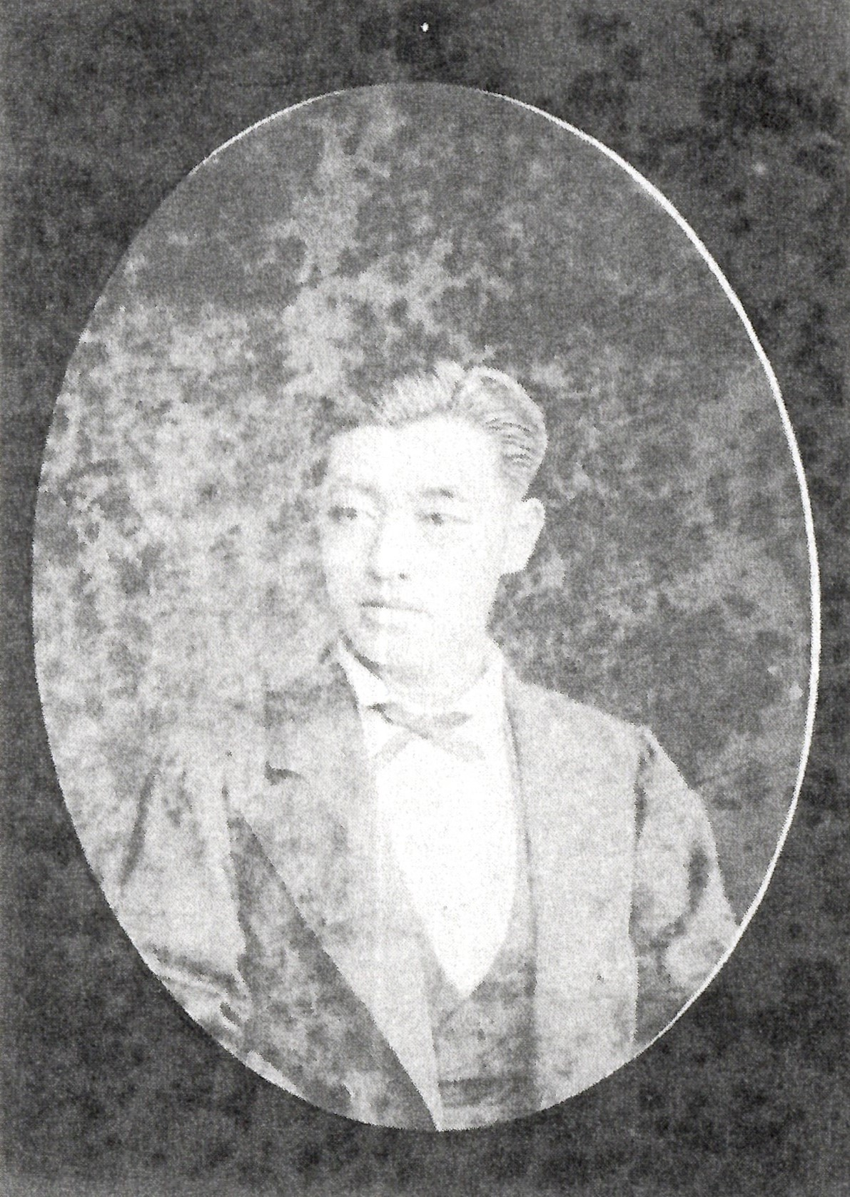 伏原宣足の肖像写真。